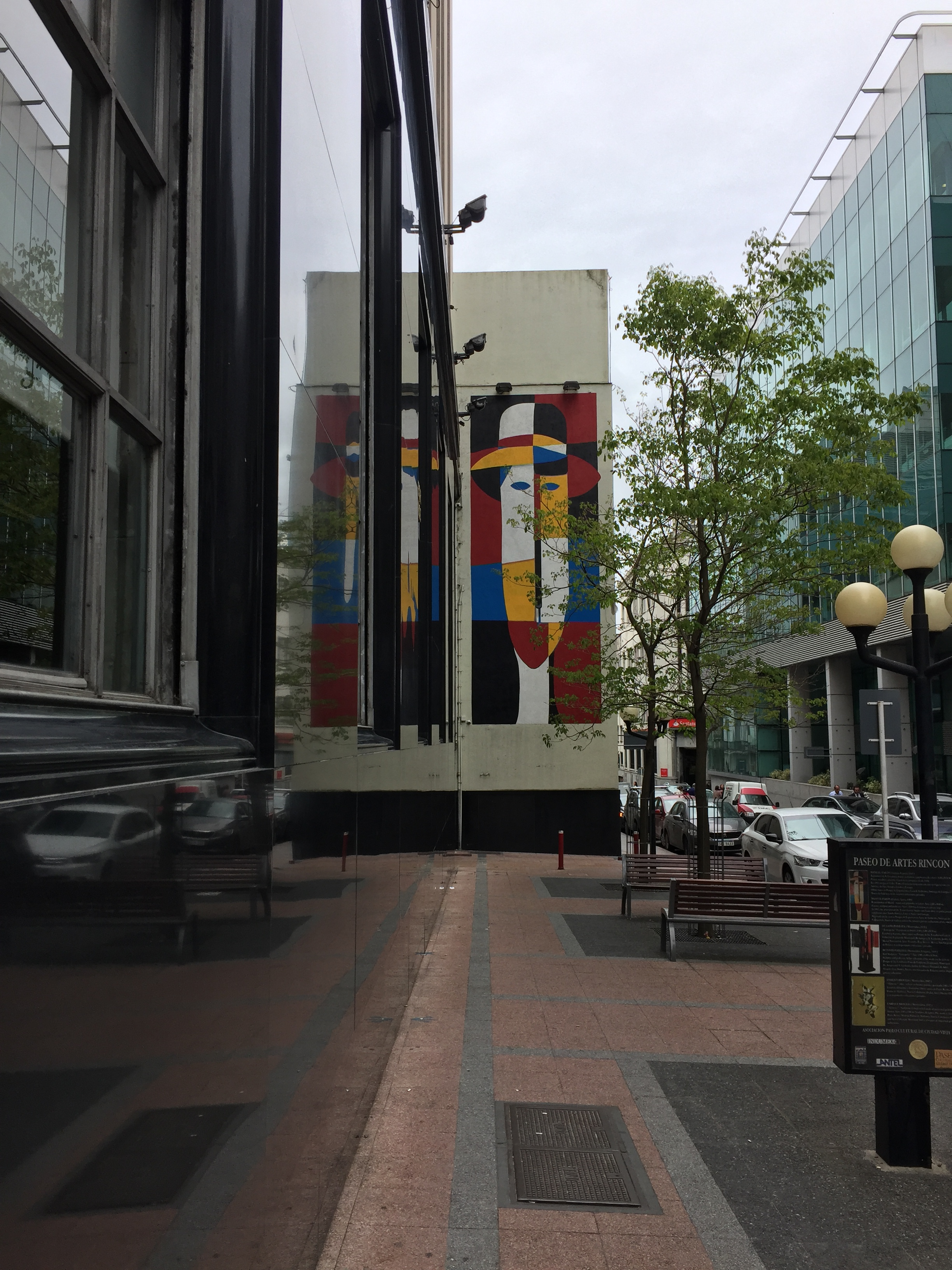 Mural de Manuel Pailós, reproducción del original en un muro de la Ciudad Vieja sobre la calle Treinta y Tres.